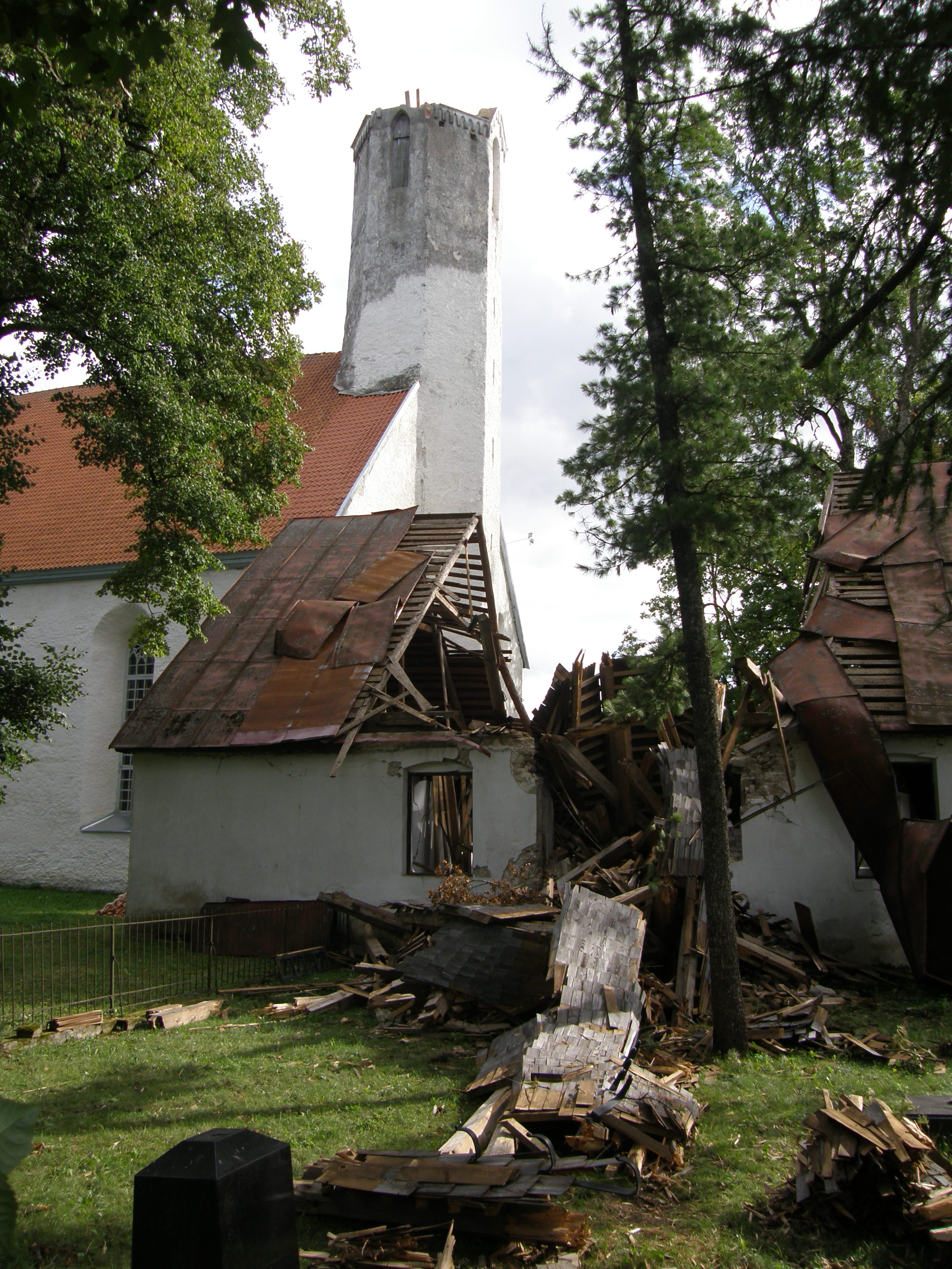 Väike-Maarja kirik ja Eesti kabel pärast augustitormi 2010.